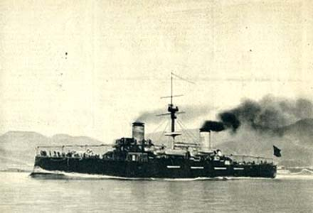 Crucero "Cristobal Colón" en pruebas de mar 1897